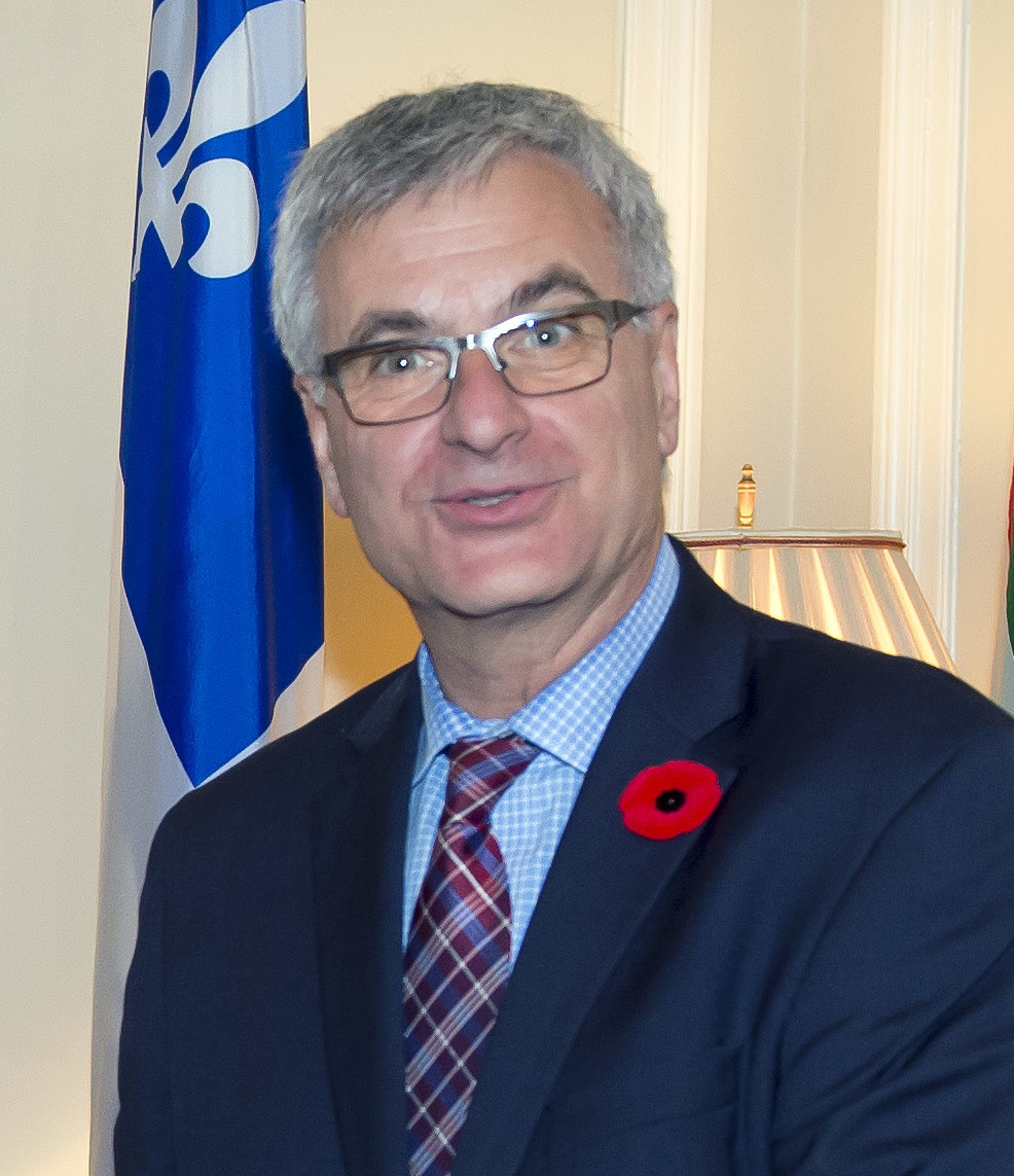 Quebec-era bidaia ofiziala:Lehendakariak Quebec-eko Legebiltzarra bisitatuko du